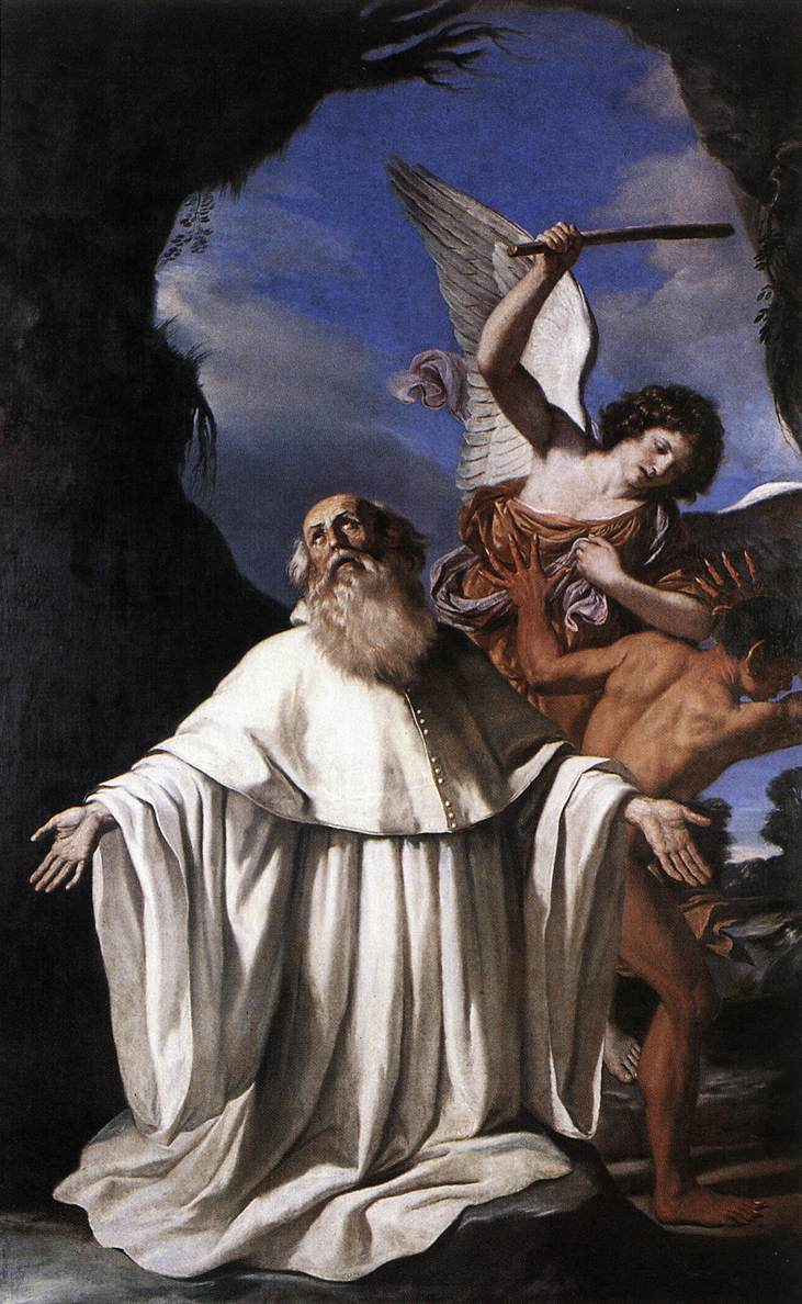 San Romualdo, ol/tl, 292 x 184 cm, Ravenna, Pin. Comunale